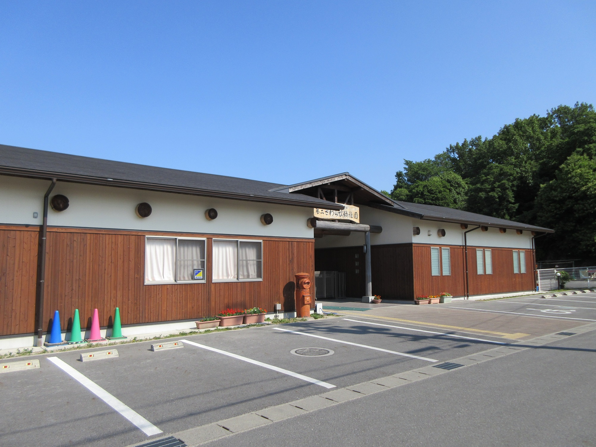 第二早蕨幼稚園（岡崎市洞町）